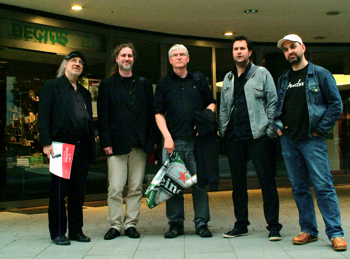 Am Abend des 10. Juni 2010 lasen anläßlich der Veranstaltung "Hannover im Wort - Zeichen zum Gedenken an die nationalsozialistischen Bücherverbrennung vier Autoren in der Buchhandlung Decius in der Marktstraße/Ecke Karmarschstraße unter dem Motto "„... dann kann einem keiner etwas tun“ – Worte gegen rechts".